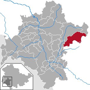 Zella-Mehlis in Thuringia - District Schmalkalden-Meiningen